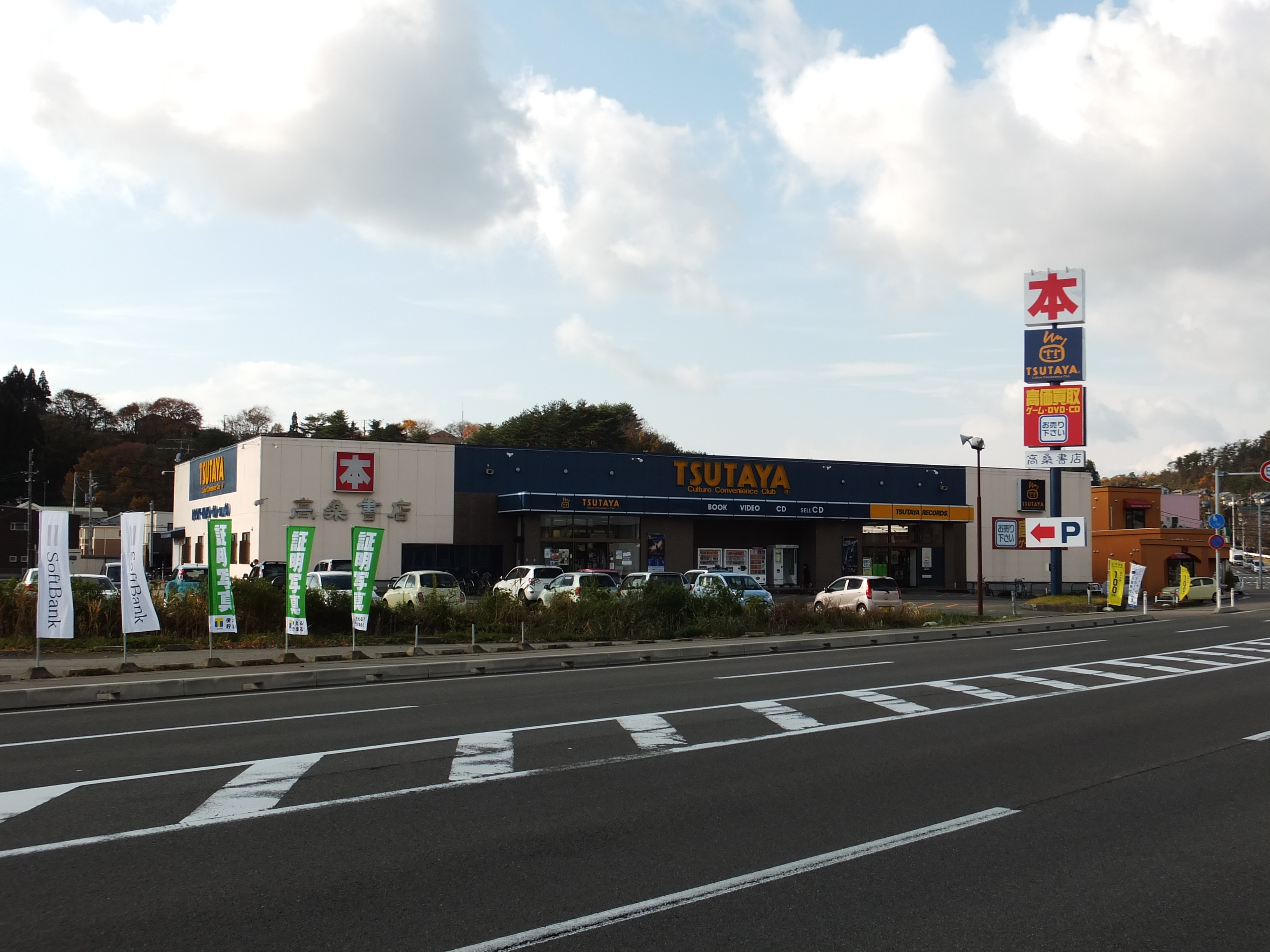 高桑書店/TSUTAYA広面店（秋田市広面、秋田県道41号秋田昭和線（横山金足線）沿い）。高桑書店は秋田県内でのTSUTAYAチェーンのフランチャイズである。